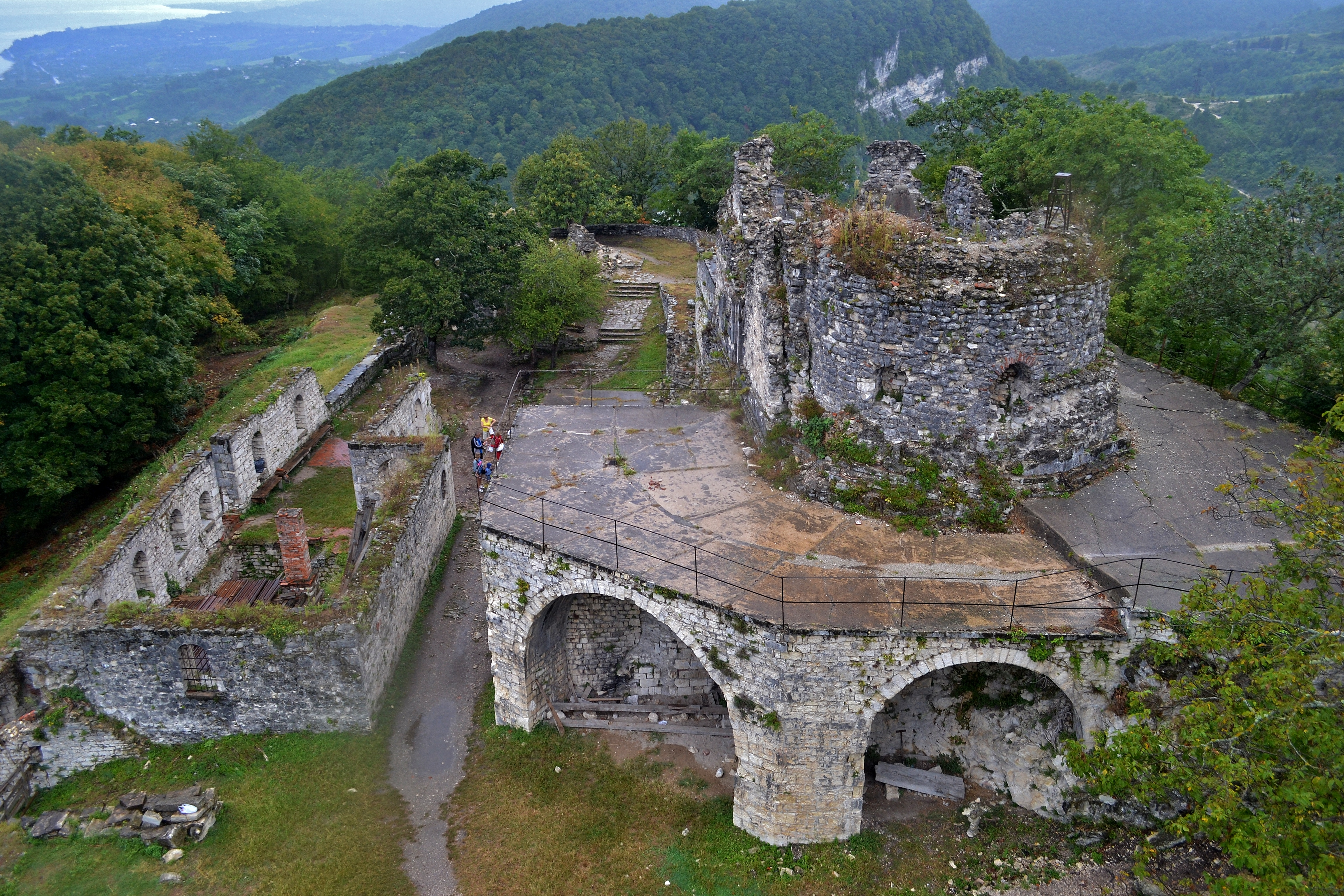 Анакопийская крепость внутри